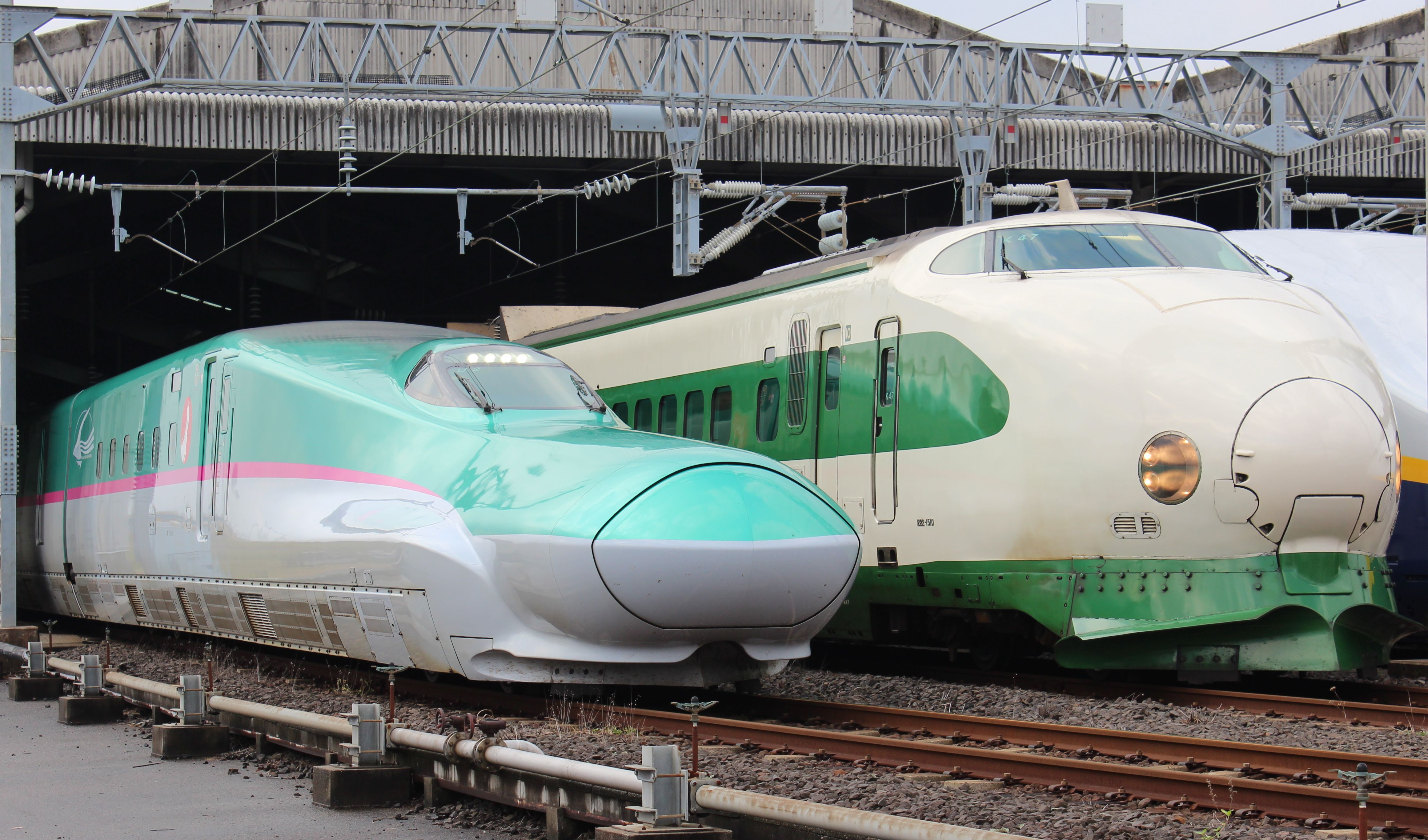 新幹線E5系・200系電車